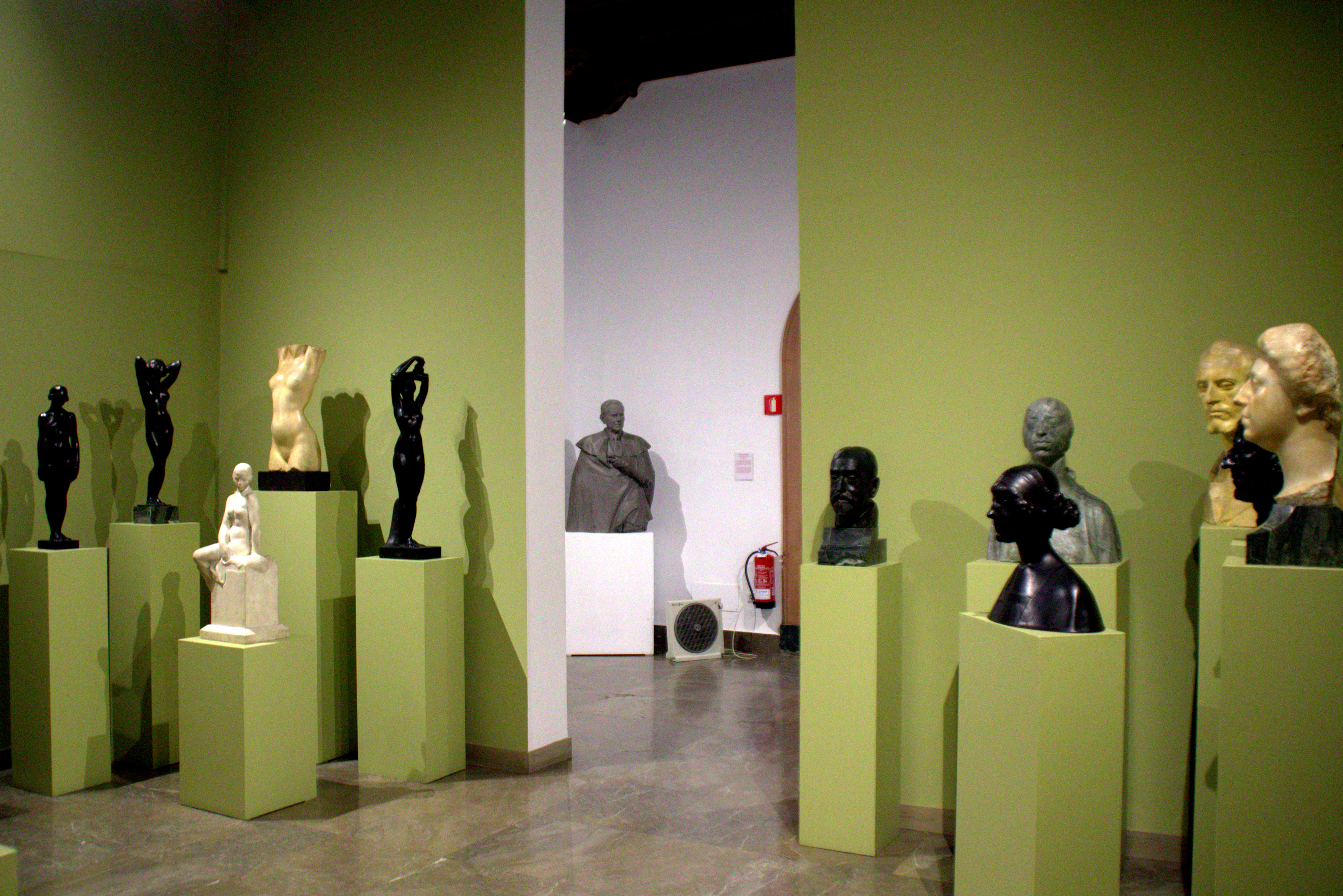 Museo de Bellas Artes de Córdoba (España).